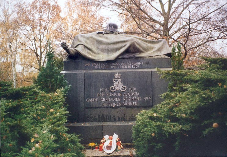 Garde-Grenadier_Regiment_No_4 Gedenkstein auf dem Städtischen Friedhof am Columbiadamm (ehemals 'Neuer Garnisonfriedhof').